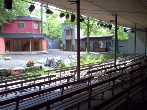 Waldbühne Sigmaringendorf, vom Zuschauerraum aus gesehen